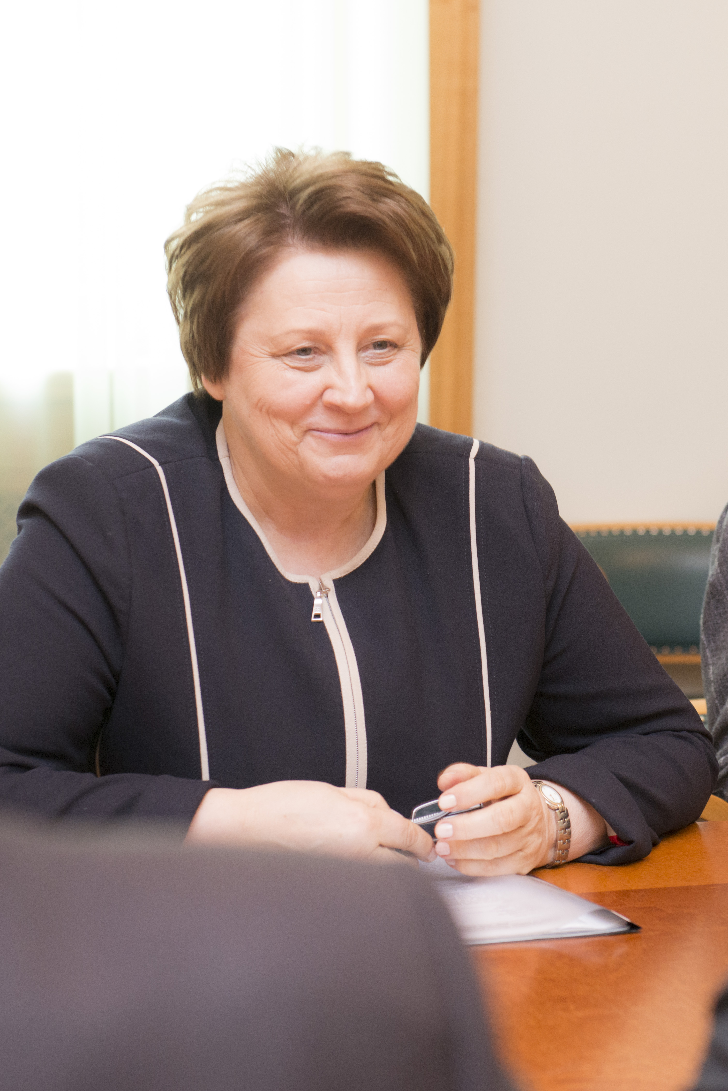 2014.gada 12.maijs. Baltijas Asamblejas Latvijas delegācija tiekas ar Ministru prezidenti Laimdotu Straujumu. Foto: Reinis Inkēns, Saeimas Kanceleja Izmantošanas noteikumi: saeima.lv/lv/autortiesibas